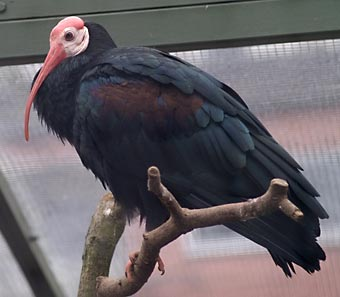 Geronticus calvus (Glattnackenibis) im Zoo Köln